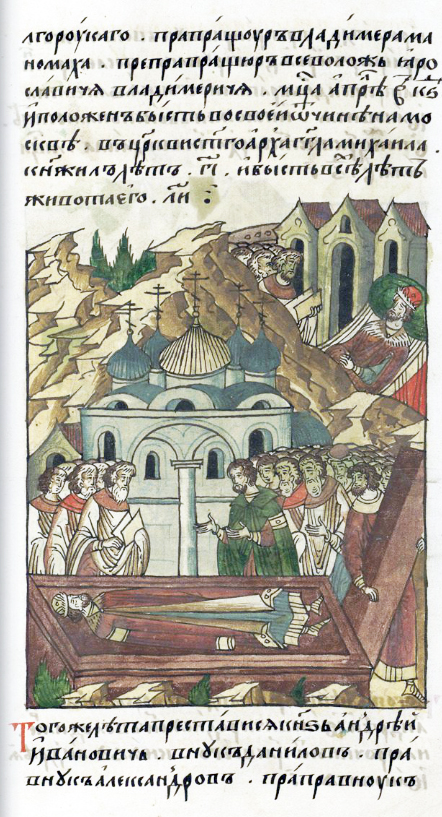 ЛИЦЕВОЙ ЛЕТОПИСНЫЙ СВОД В том же году преставился князь Андрей Иванович, внук Данилов, правнук Александров, праправнук Долгорукова, прапращура Владимира Мономаха, препрапращура Всеволода, Ярославича, Владимировича, месяца апреля в 26 день. И положен был в своей отчине на Москве в церкви святого архангела Михаила. Княжил 13 лет, и было всего ему 38 лет. 132 В том же году у преставивщегося князя Андрея Ивановича родился сын Владимир на сороковины отца своего князя Андрея Ивановича. Ярославов, препраправнук Всеволодов, потомок пращура Юрия Долгорукого, после сороковин брата своего Семена Ивановича на третий день. И положен был на Москве в той же церкви святого архангела Михаила, месяца июля в 6 день.